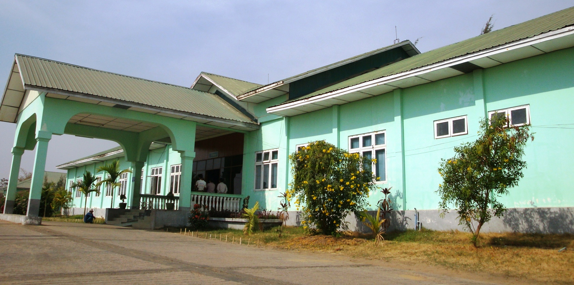 Naypyidaw, Naypyidaw Capital Region, Myanmar: Naypyitaw General Hospital.